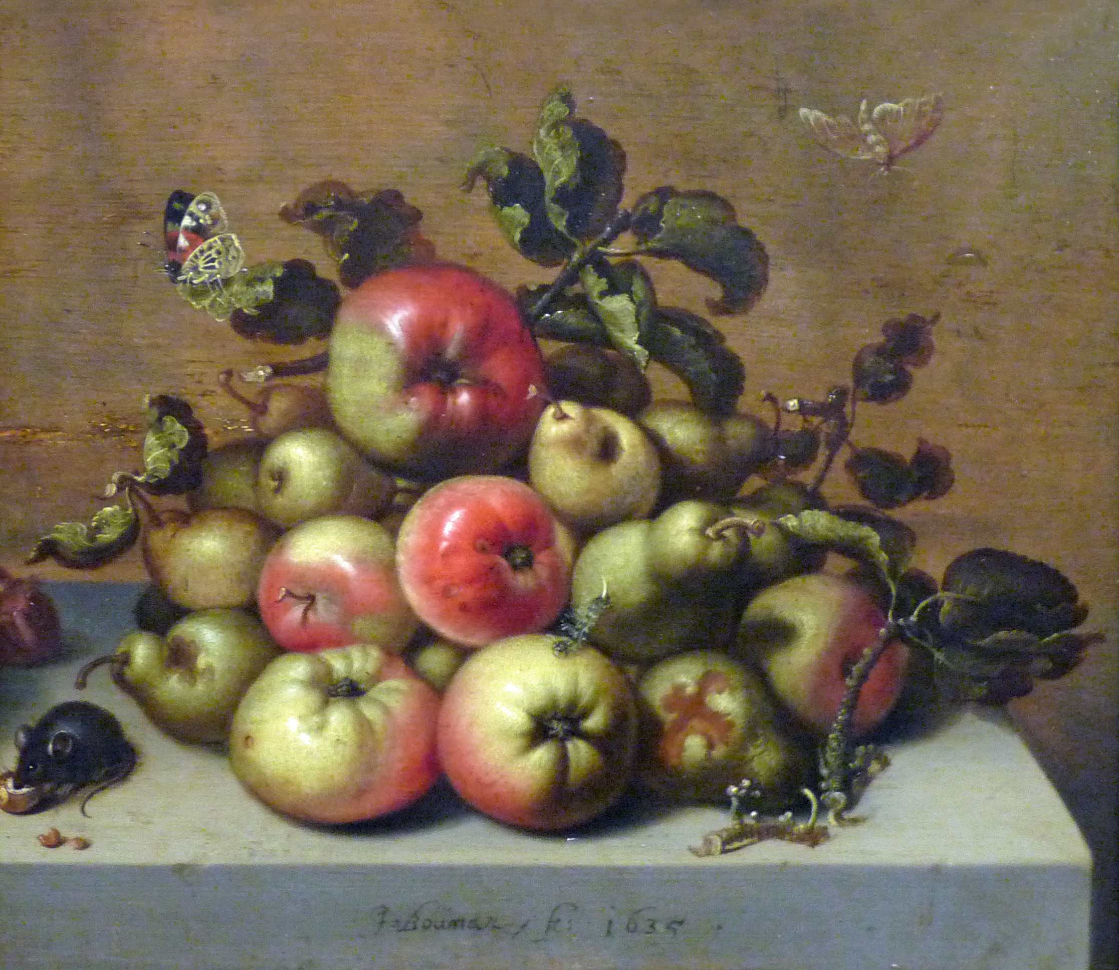 Jan Bouman (Strasbourg 1602-établi à Amsterdam en 1622), Nature morte, huile sur bois, 1635, Musée des beaux-arts de Strasbourg